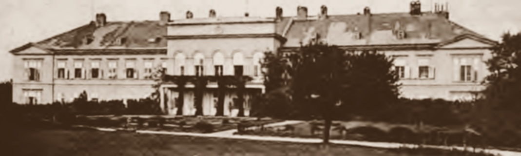 Die Privatheilanstalt zu Ober-Döbling Wien, XIX. Bezirk, Hirschengasse 71“, Leipzig und Wien 1891